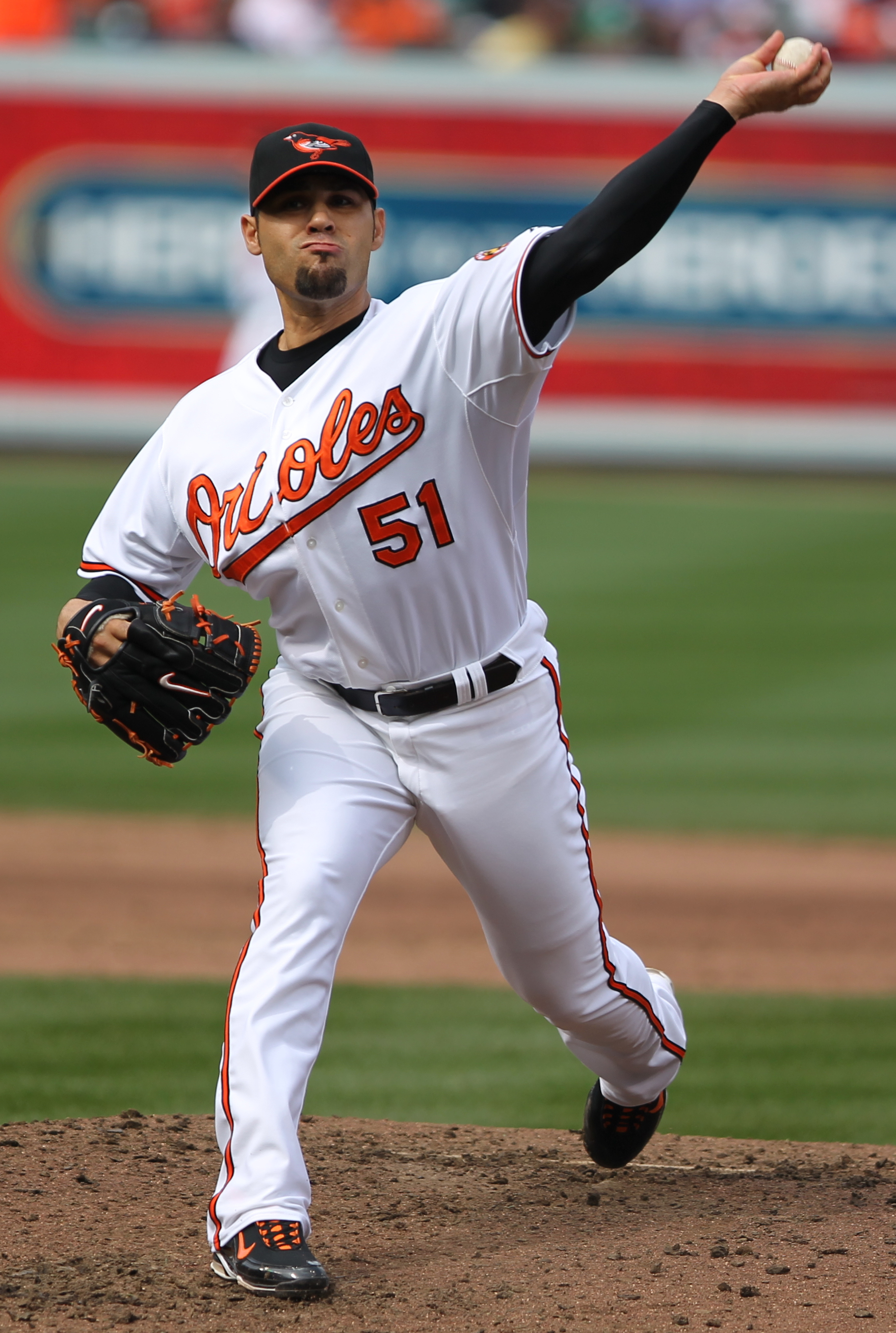 Michael Gonzalez